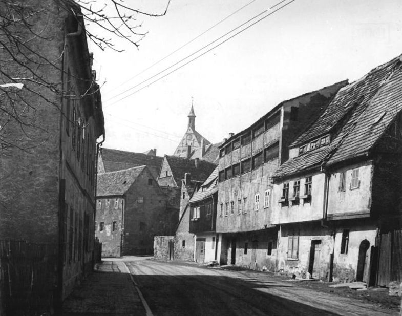 Freiberg, Mühlgraben, Gerberhäuser Zentralbild Schlegel 14.4.1956 Wjt-Th. Schöne deutsche Heimat. Die historische Bergstadt Freiberg. UBz: Alte Gerberhäuser mit Blick auf den Dom am Mühlgraben.